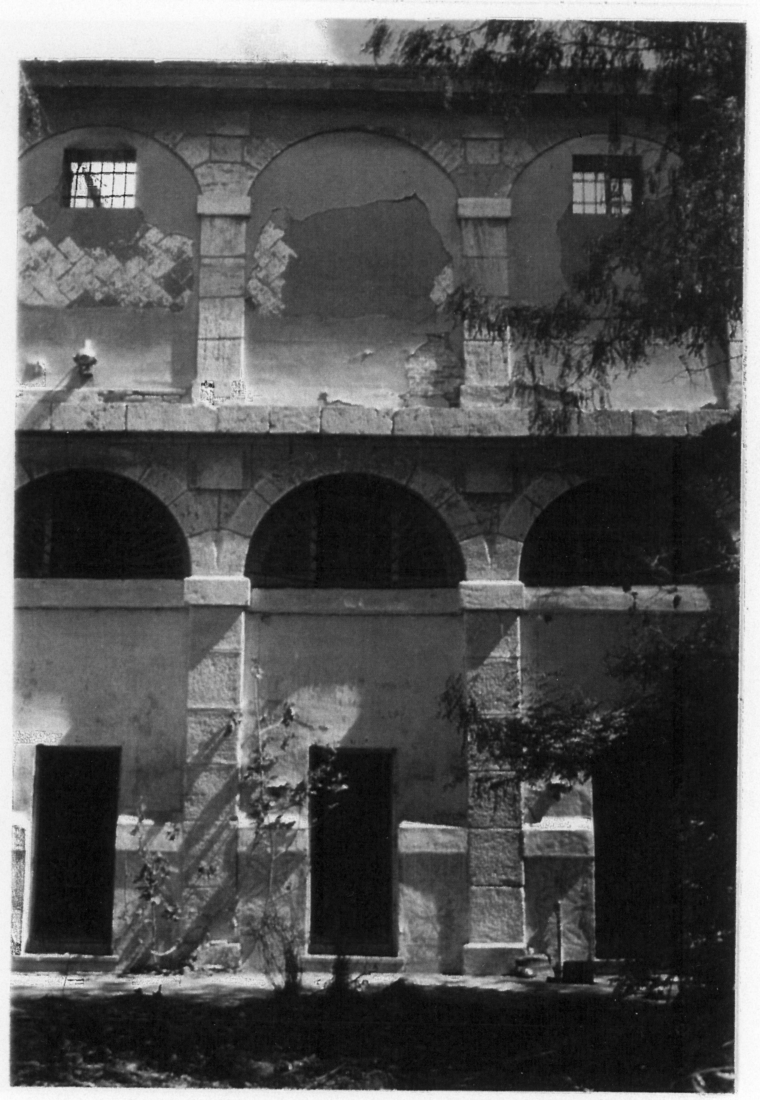 Alzado del patio del Convento de Santo Tomás (Parador de Alcalá de Henares)